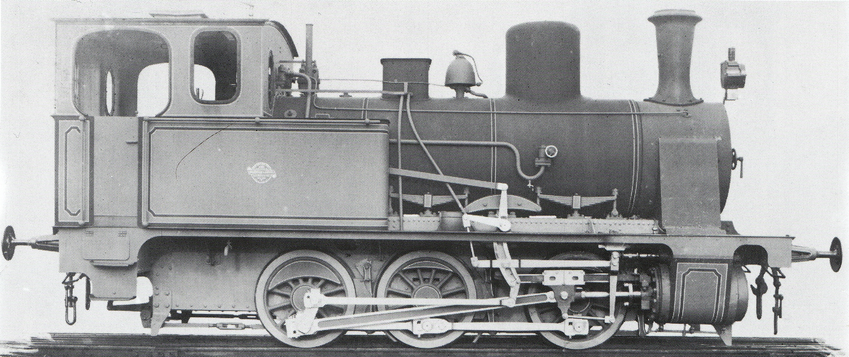 Tender-Locomotive Ed 3/3 von Brown, Boveri & Cie., gebaut 1908 von Orenſtein & Koppel zů Berlin (Fabr.-Nr. 3069), bis 1910 als Nr. 51 an die Seethalbahn ausglihen, 1914 gen Brüſſel verkauft.